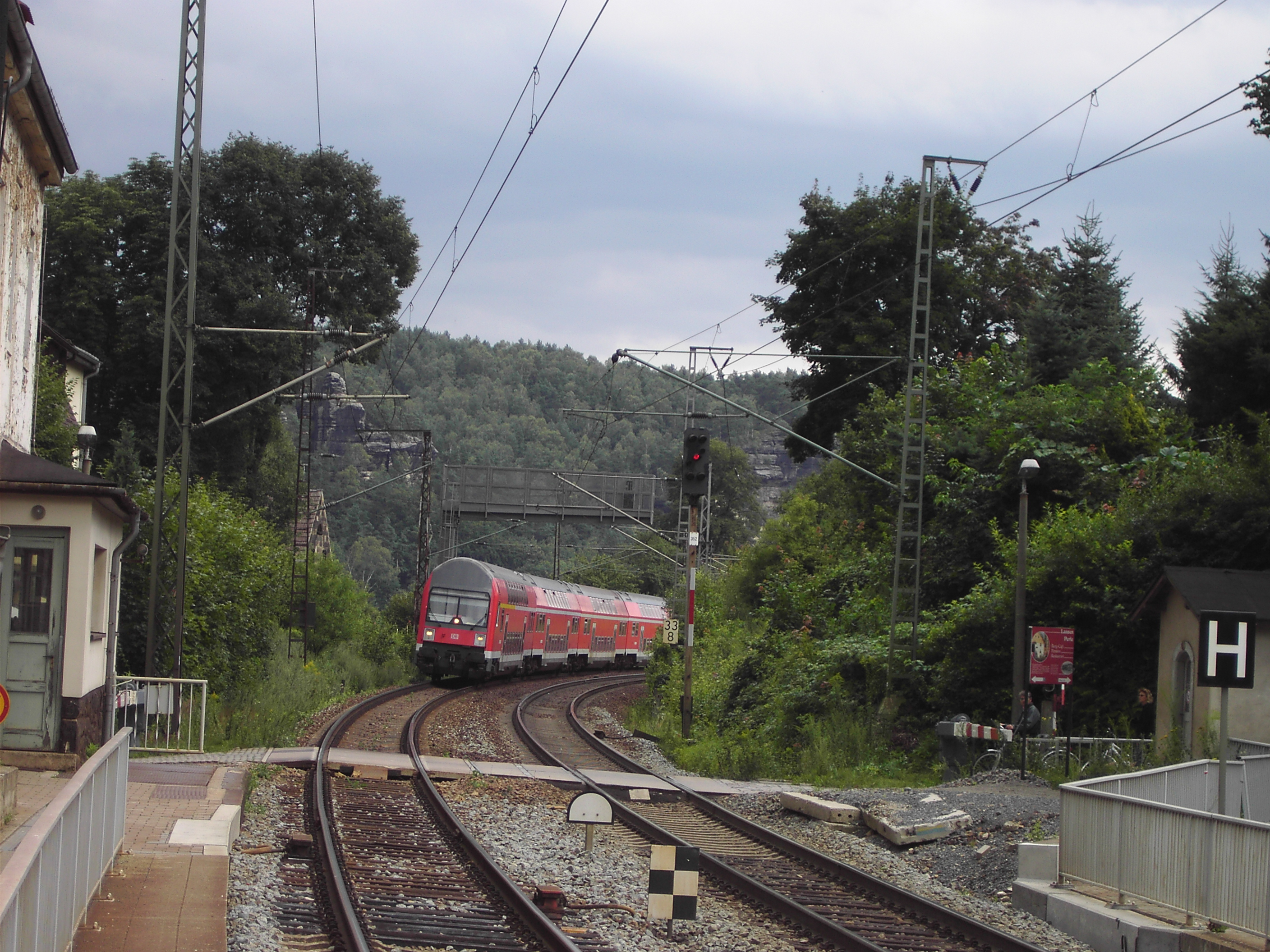 Doppelstockzug der S-Bahn Dresden (Linie S1) aus Schöna fährt auf den Bahnhof Rathen zu.